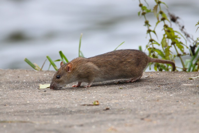 Eine sich an einem Bachlauf aufhaltende Wanderratte.